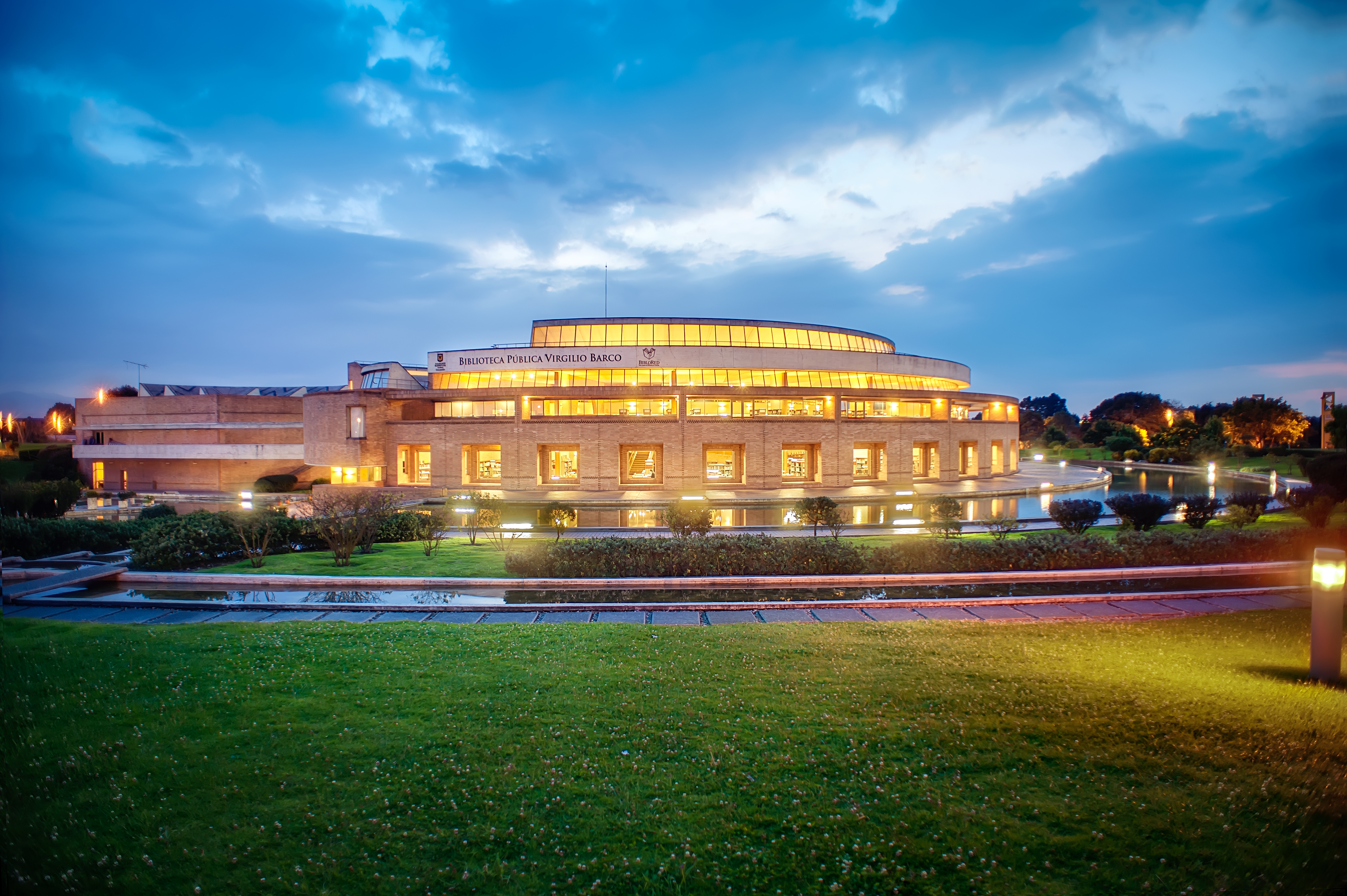 Vista nocturna de la Biblioteca Pública Virgilio Barco Vargas, en Bogotá, Colombia